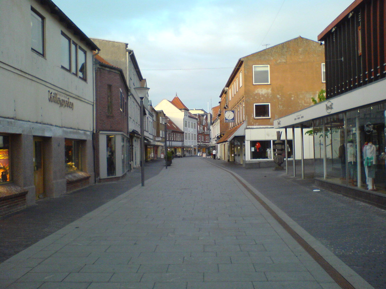 Odder GÃ¥gade om aftenen, maj 2007